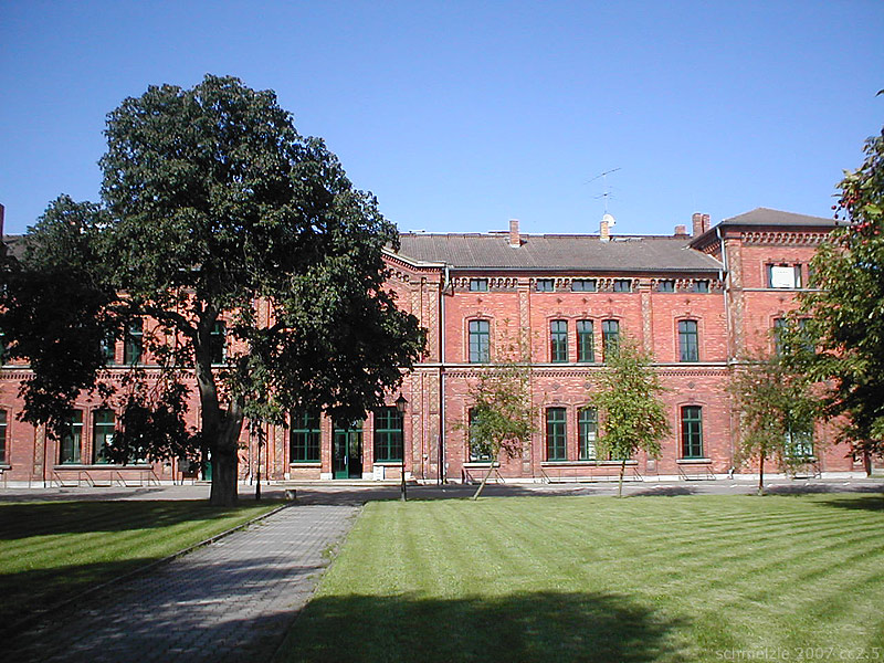 Bahnhof in Malchin, Mecklenburg-Vorpommern, Deutschland